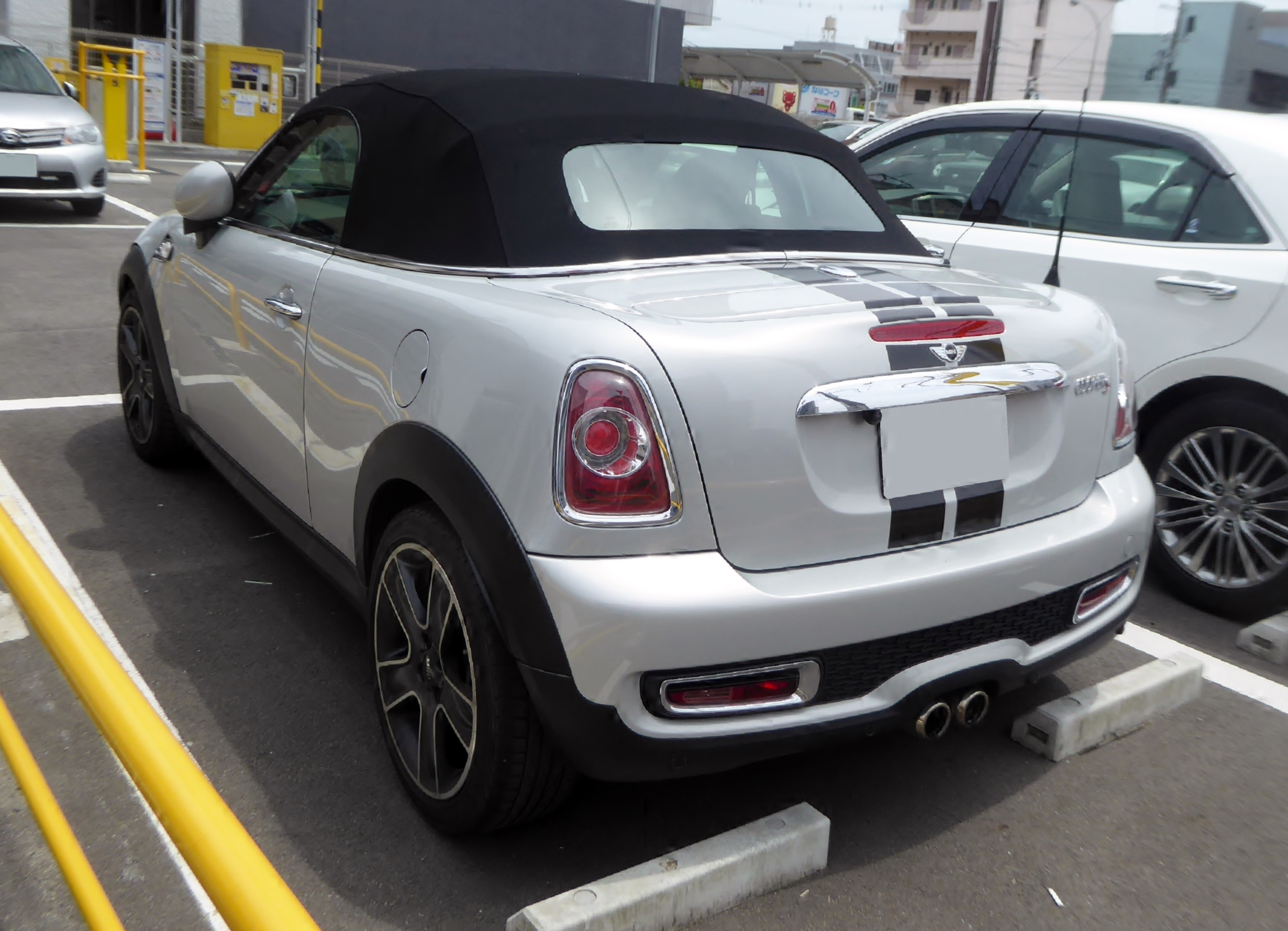 R59系BMW・ミニクーパーSロードスターをリアから撮影。